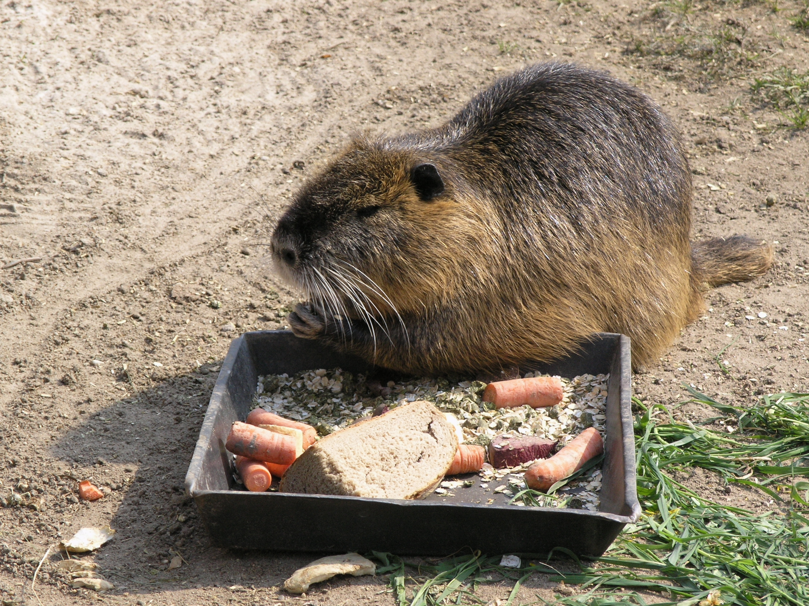 Zoo Praha